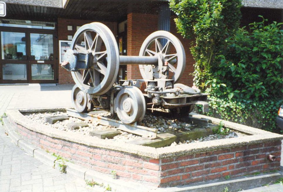 Bild eines Rollbockes mit einer Achse beladen – Denkmal eines Rollbockes der GKB vor dem früheren Geilenkirchener Kreisbahnhof – der Rollbock in Spurweite der Kreisbahngleise diente dem Transport von DB-Waggons auf Kreisbahngleisen